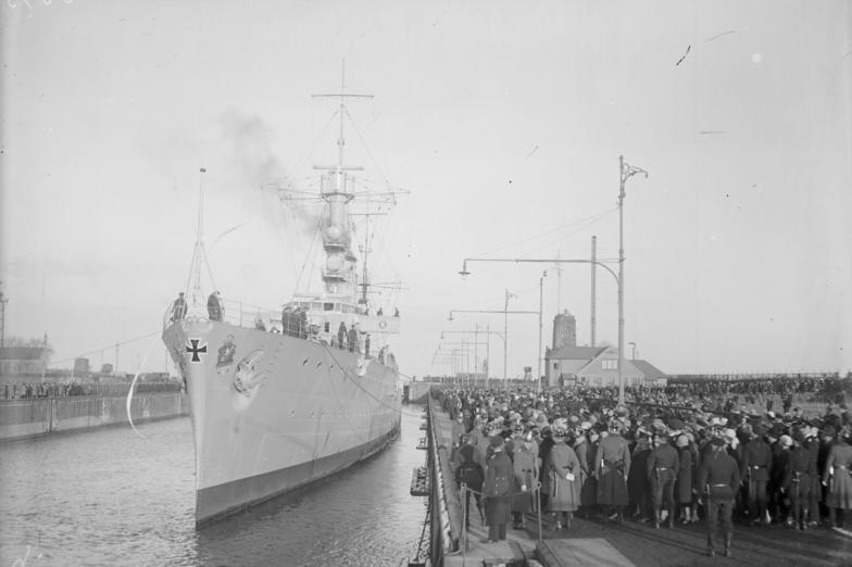 Begeisterter Empfang des Schulkreuzers Emden in Wilhelmshaven. Der Schulkreuzer Emden ist am 14. März von seiner 16 monatigen Weltreise in Wilhelmshaven zurückgekehrt. Zum Empfang hatten sich viele tausend Menschen eingefunden. Die Bevölkerung begrüßt jubelnd die Emden bei ihrer Ankunft in der Heimat.